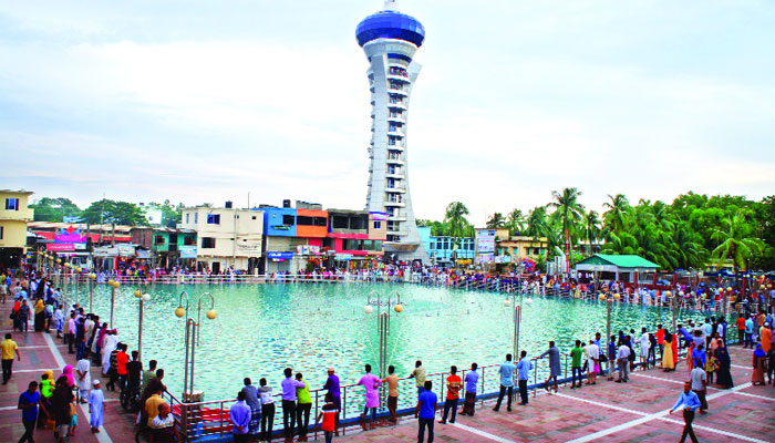 জ্যাকব টাওয়ার, চরফ্যাসন।